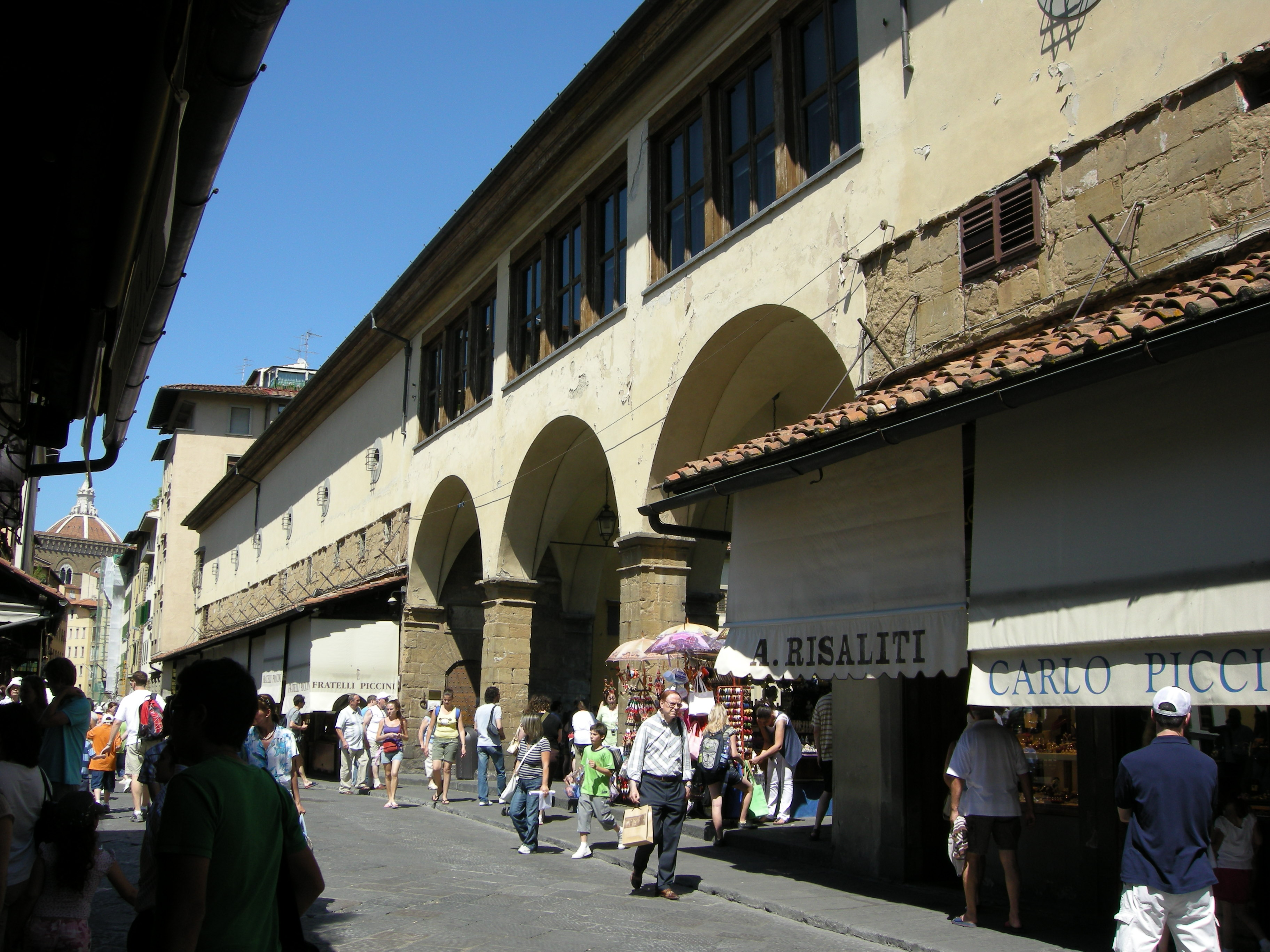 Ponte vecchio, interno